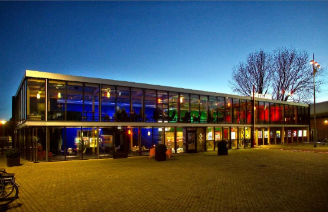 Filmtheater Hilversum in hartje centrum